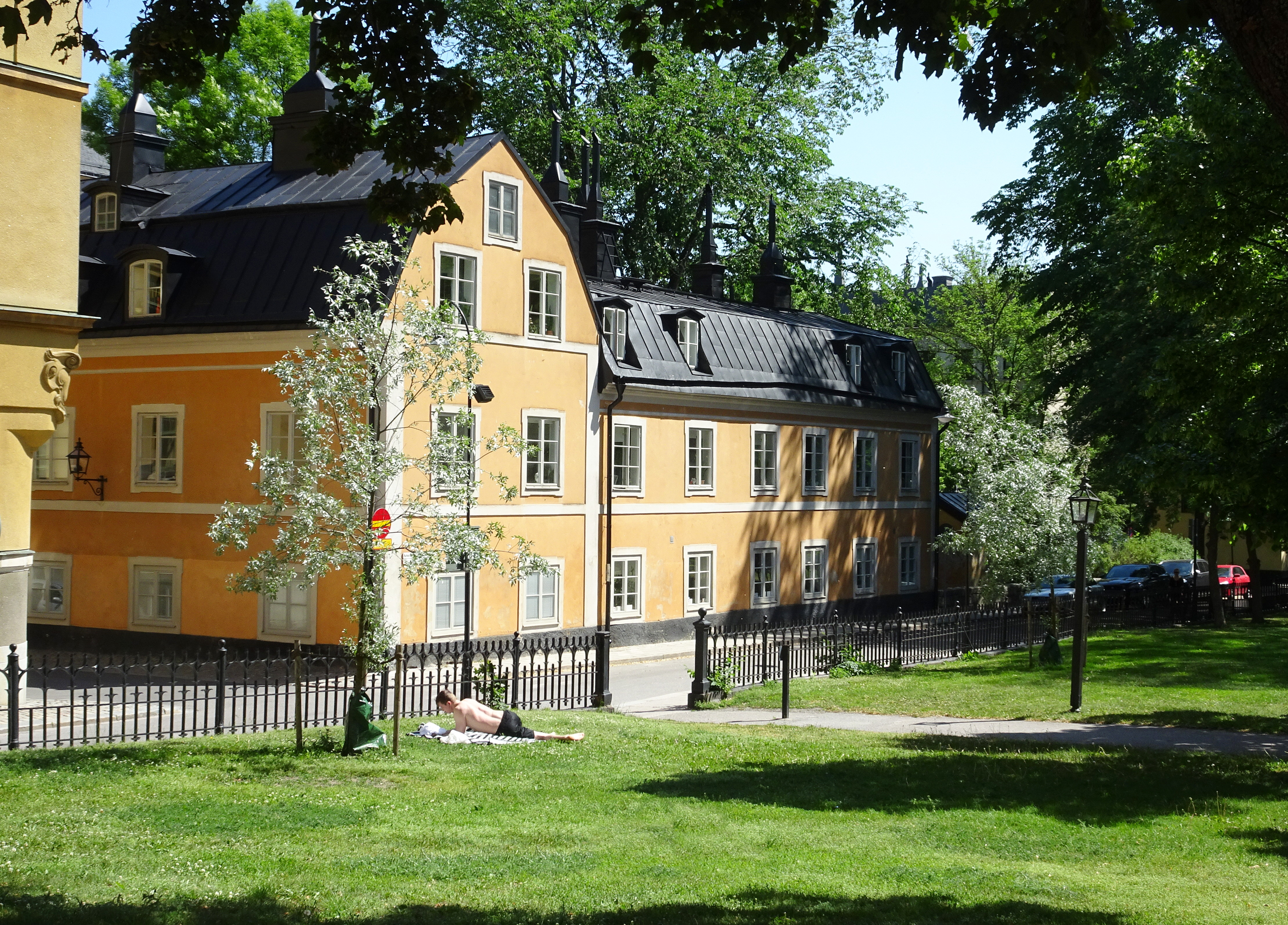 Rutenbeckska gården västerifrån